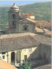 palazzo de spuches galati mamertino